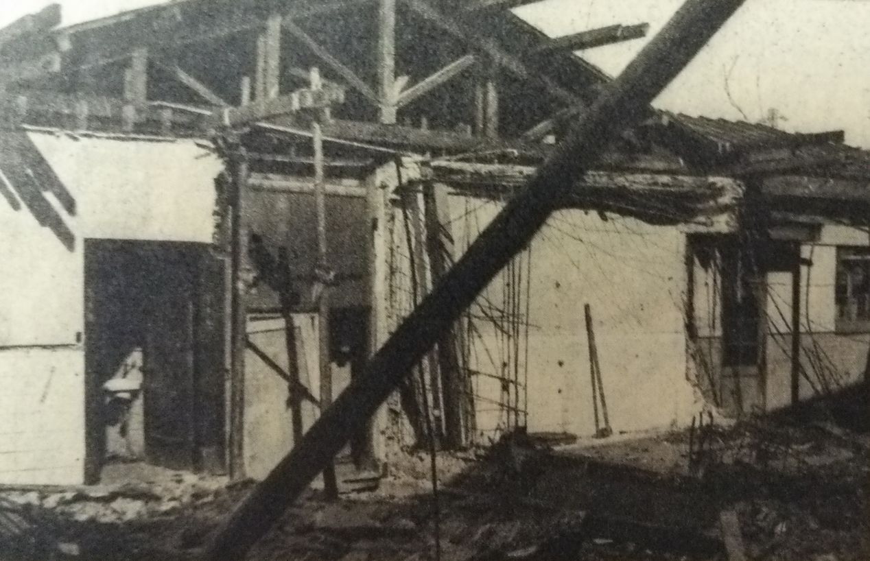 鹿地事件の監禁現場の一つ